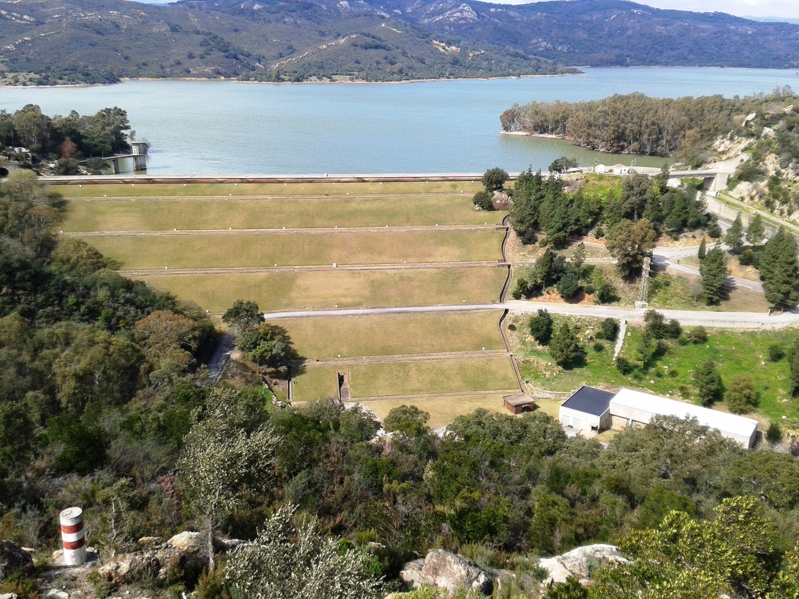 Parque natural de Los Alcornocales This is a photography of a Site of Community Importance in Spain with the ID: ES0000049. Natura2000 entry, EEA entry